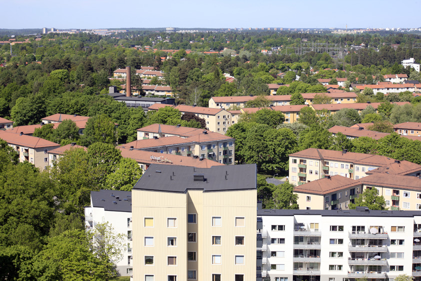 Vy över Råcksta från taket av Vattenfallhusen.